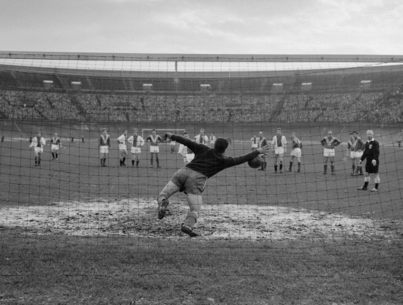 DWS tegen Ajax 1-2, Doelman Ad Visser (DWS) stopt strafschop.